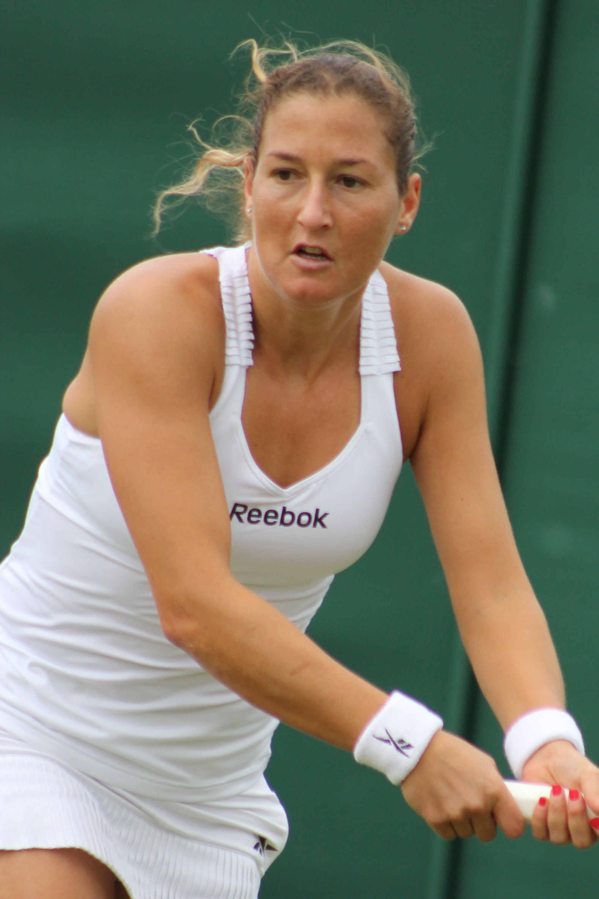 Peer WMQ15 (2)